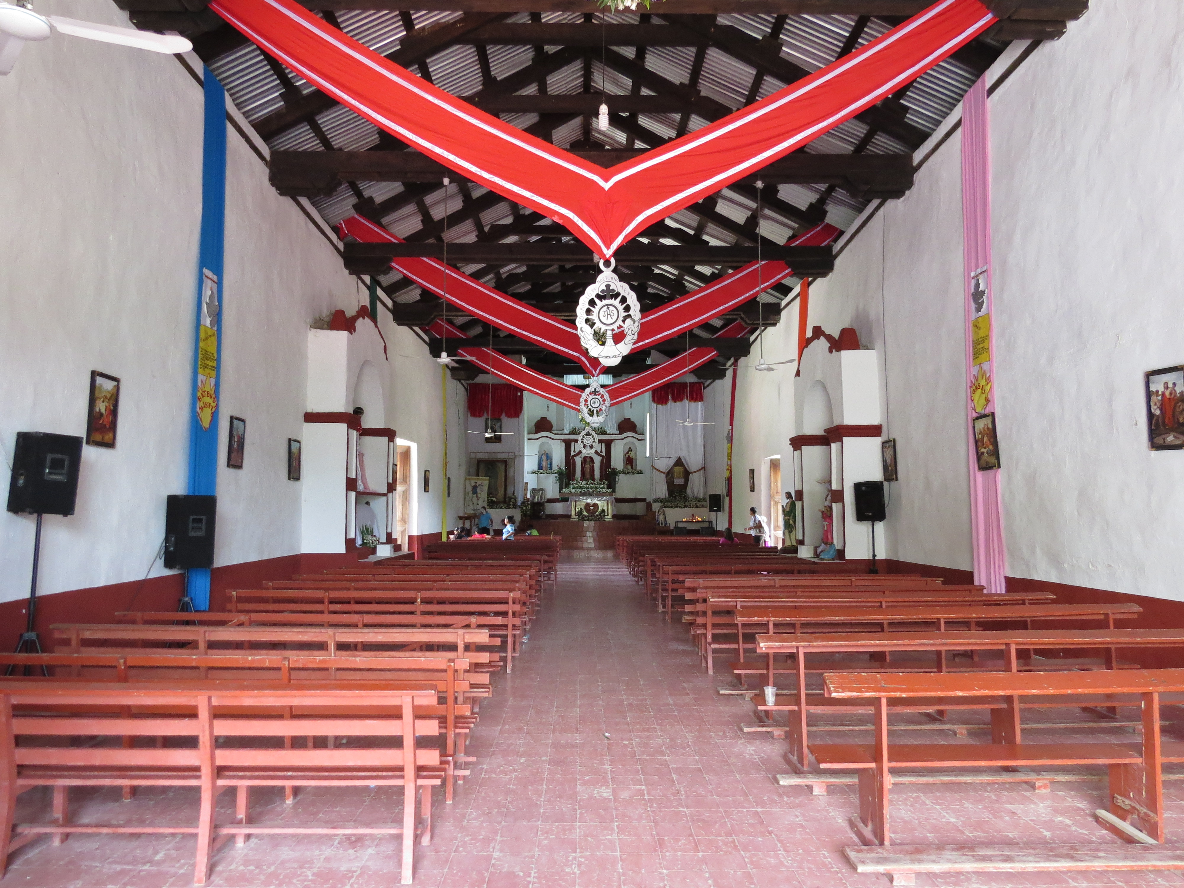 Templo católico construido en el siglo XVII. Entre 1928 y 1934 durante la campaña antirreligiosa del ex gobernador Tomás Garrido Canabal fue convertido en cuartel militar. Villa Tapijulapa, municipio de Tacotalpa, Tabasco, México.